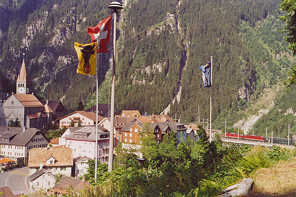 Beschreibung: Göschenen, Uri / Schweiz Fotograf: Jan Keckstein, [1]